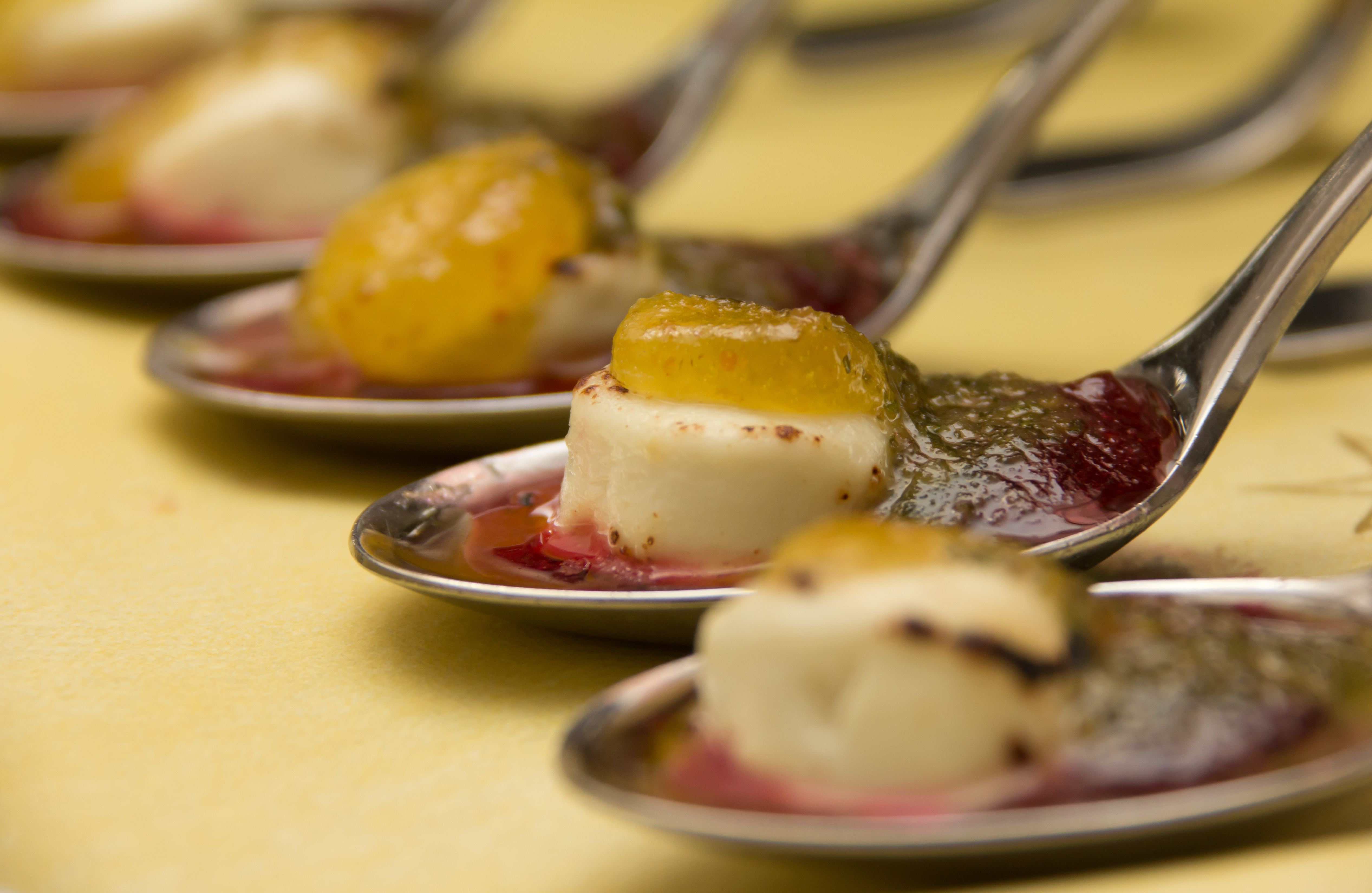 Jakobsmuschel als Vorspeise angerichtet